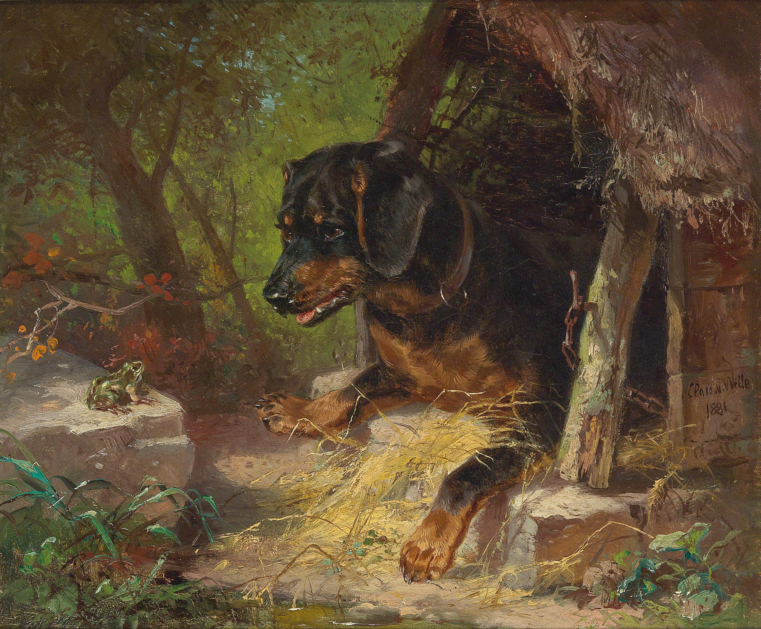 Der Frosch (Hund in Hundehütte mit Frosch), signiert datiert Clara v. Wille 1881, Öl auf Leinwand, 27,5 x 33 cm